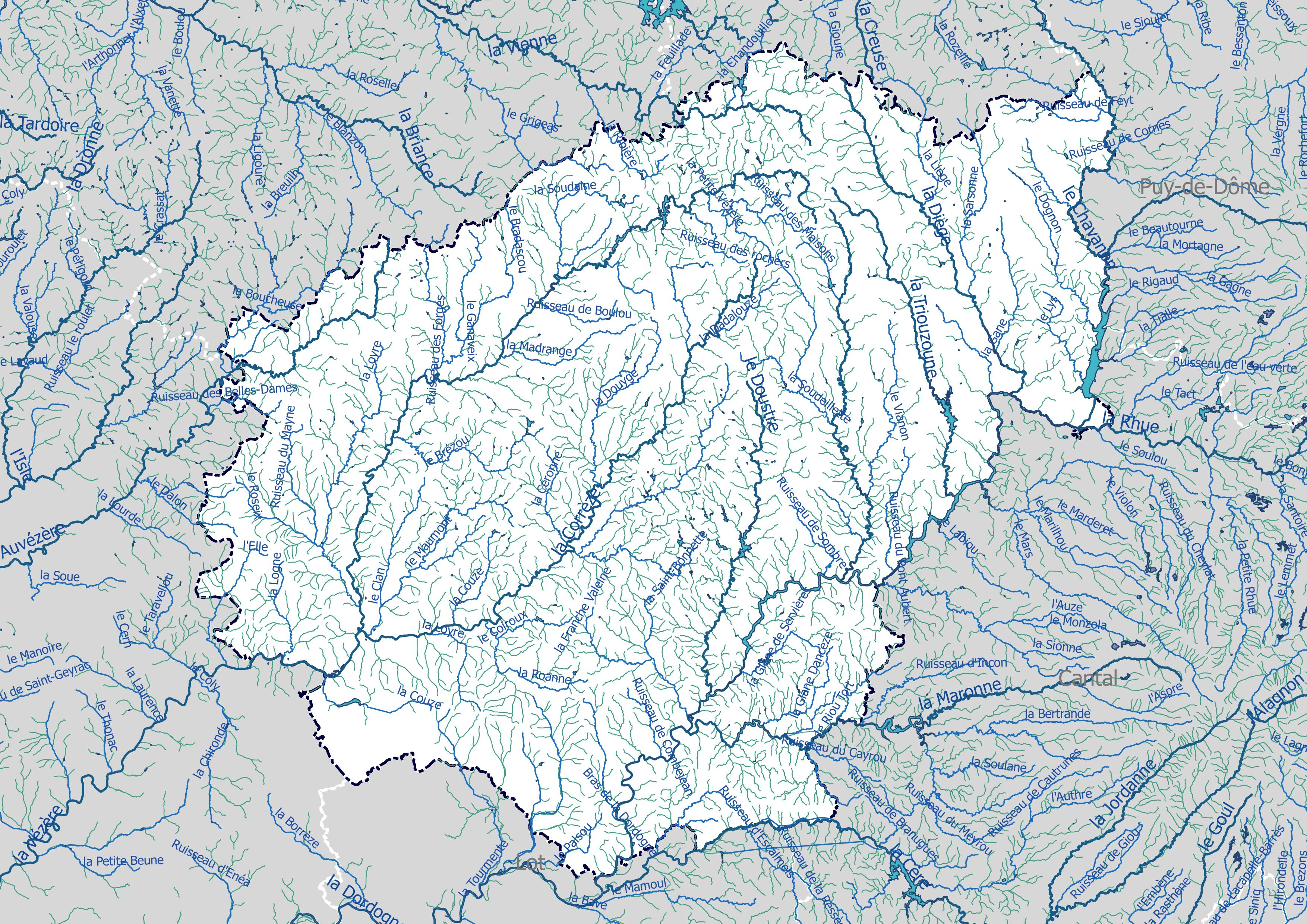 Réseau hydrographique du département de la Corrèze (France).